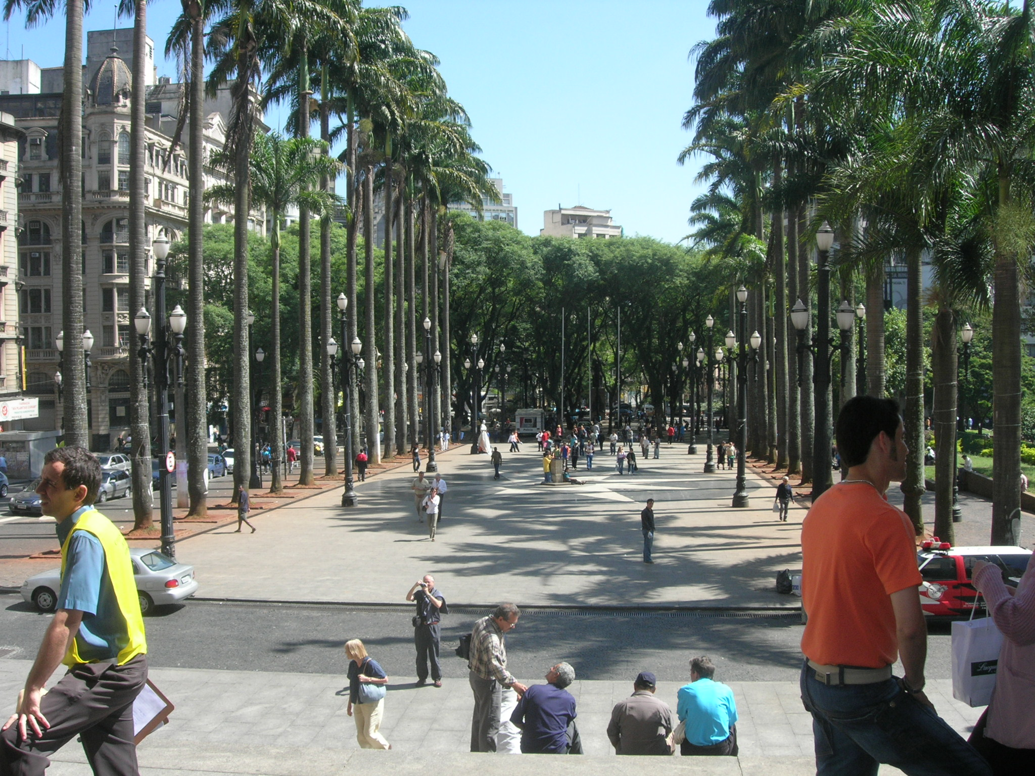 Praça da Sé. Foto tirada por mim.